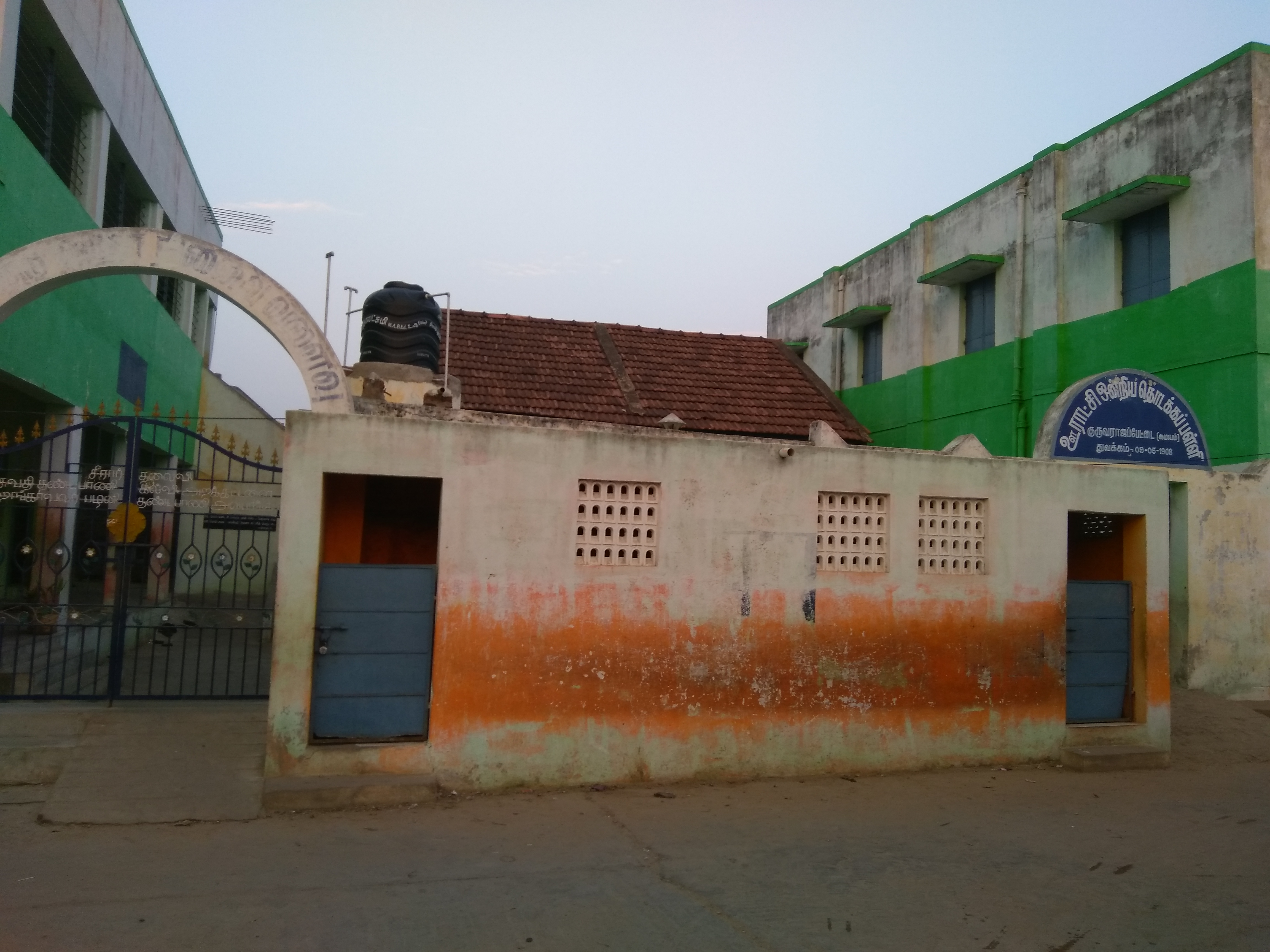 குருவராஜபேட்டை (மையம்) தொடக்கப் பள்ளி